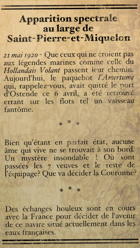 Extrait de presse - La Gazette d'Ostende - 21 mai 1920